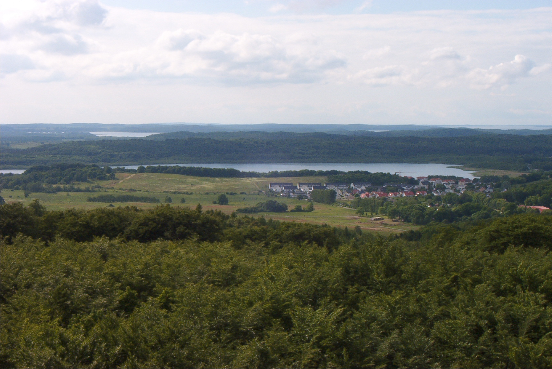 Rügen: Schmachter See bei Binz